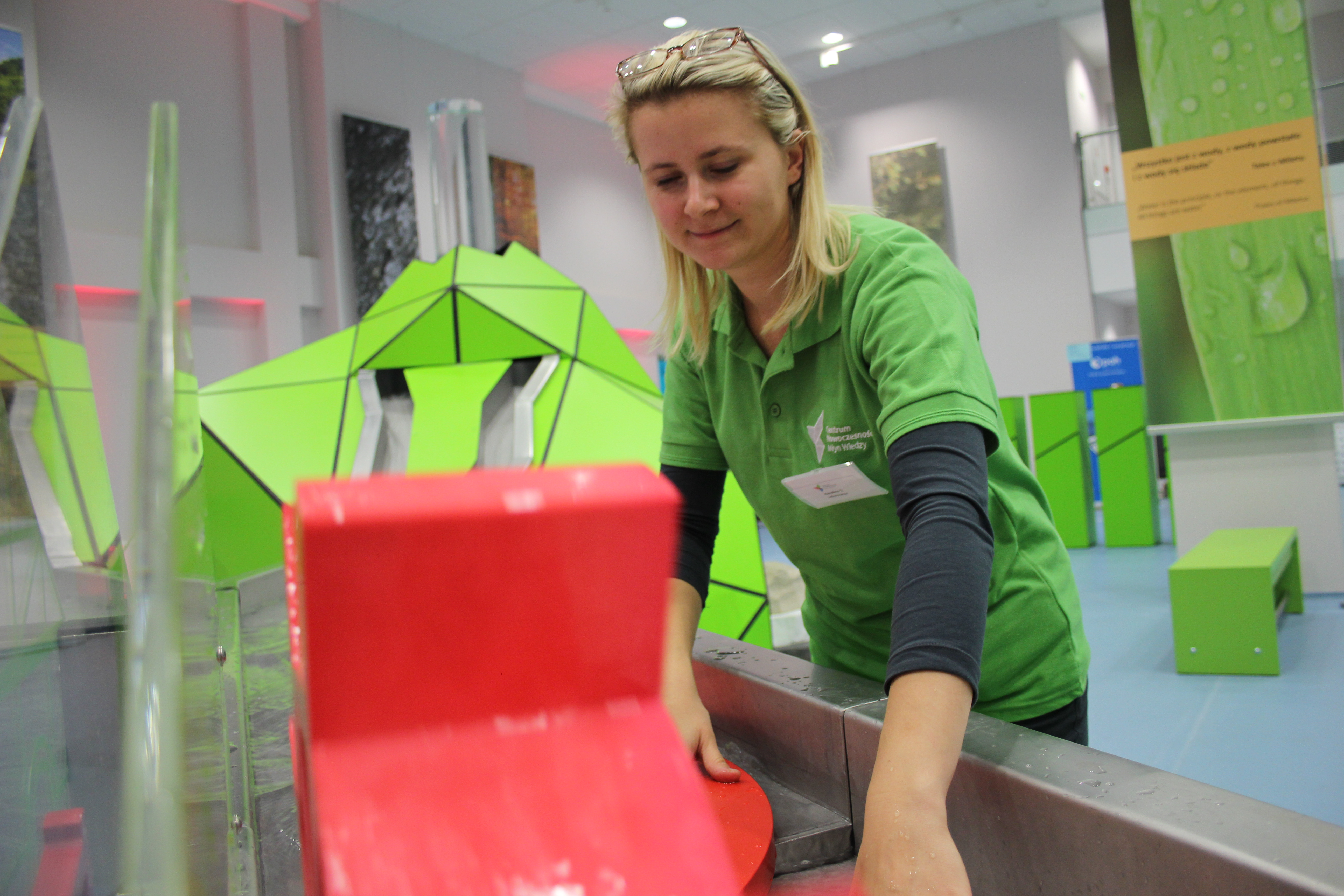 Wystawa stała "Rzeka"